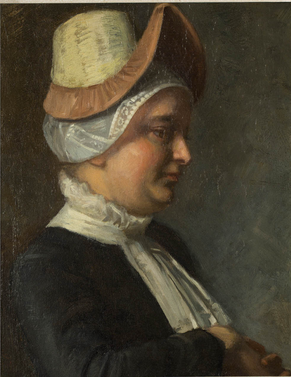 Westfriese boerenvrouw in klederdracht